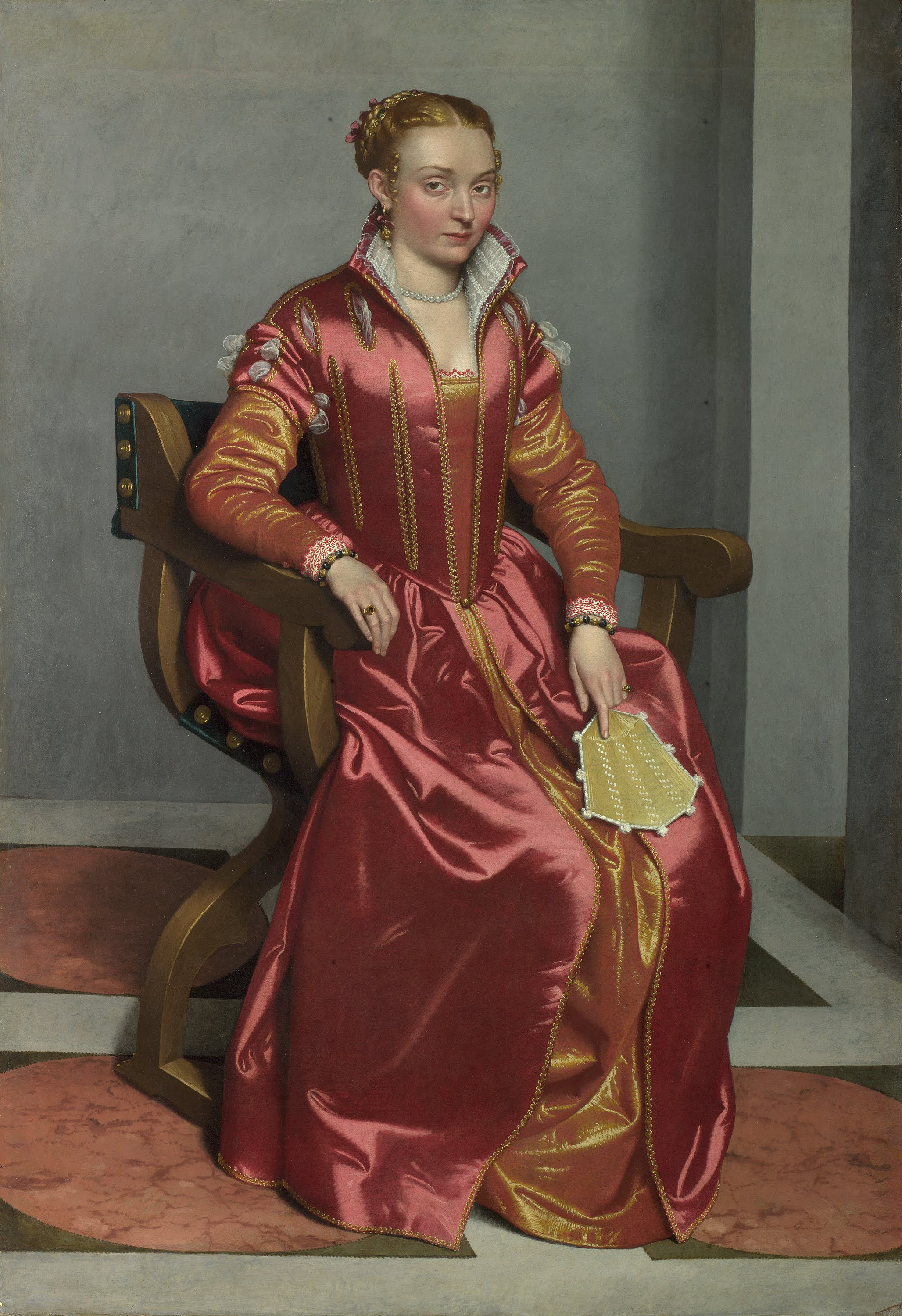 Depicted person: Possibly Contessa Lucia Albani Avogadro